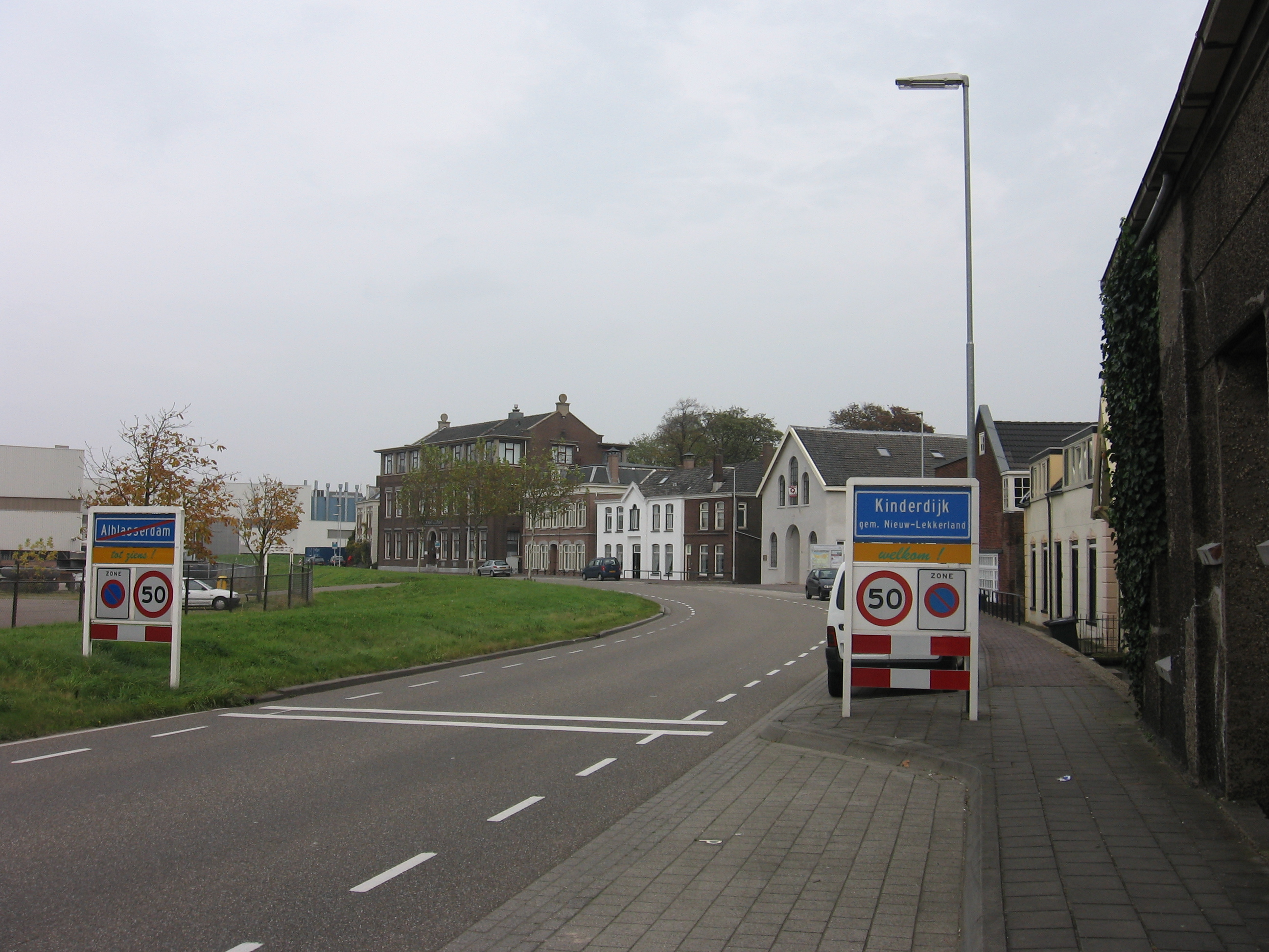 Kinderdijk